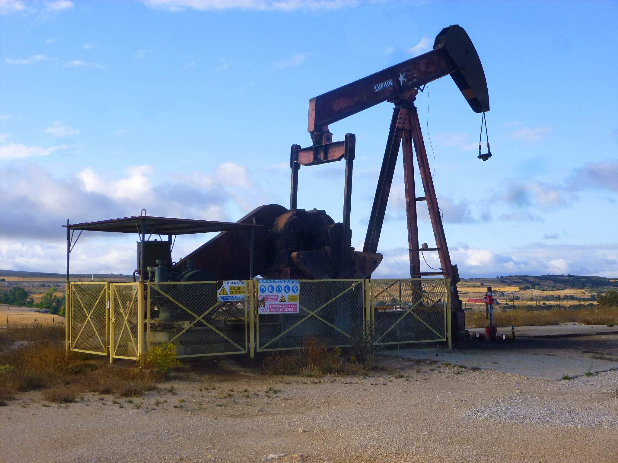 Campo Petrolífero de Ayoluengo (Burgos)